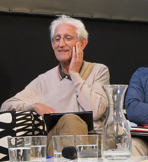 HUHEZI (Mondragon Unibertsitatea) Isiltasunaren gaineko jardunaldia